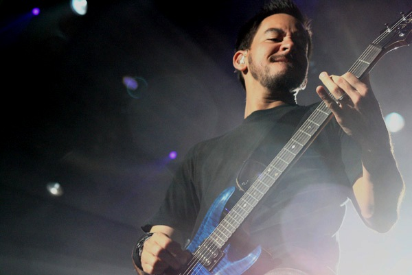 Mike Shinoda